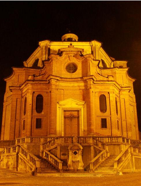 Grignasco (Novara): la chiesa parrocchiale di Maria Vergine Assunta.